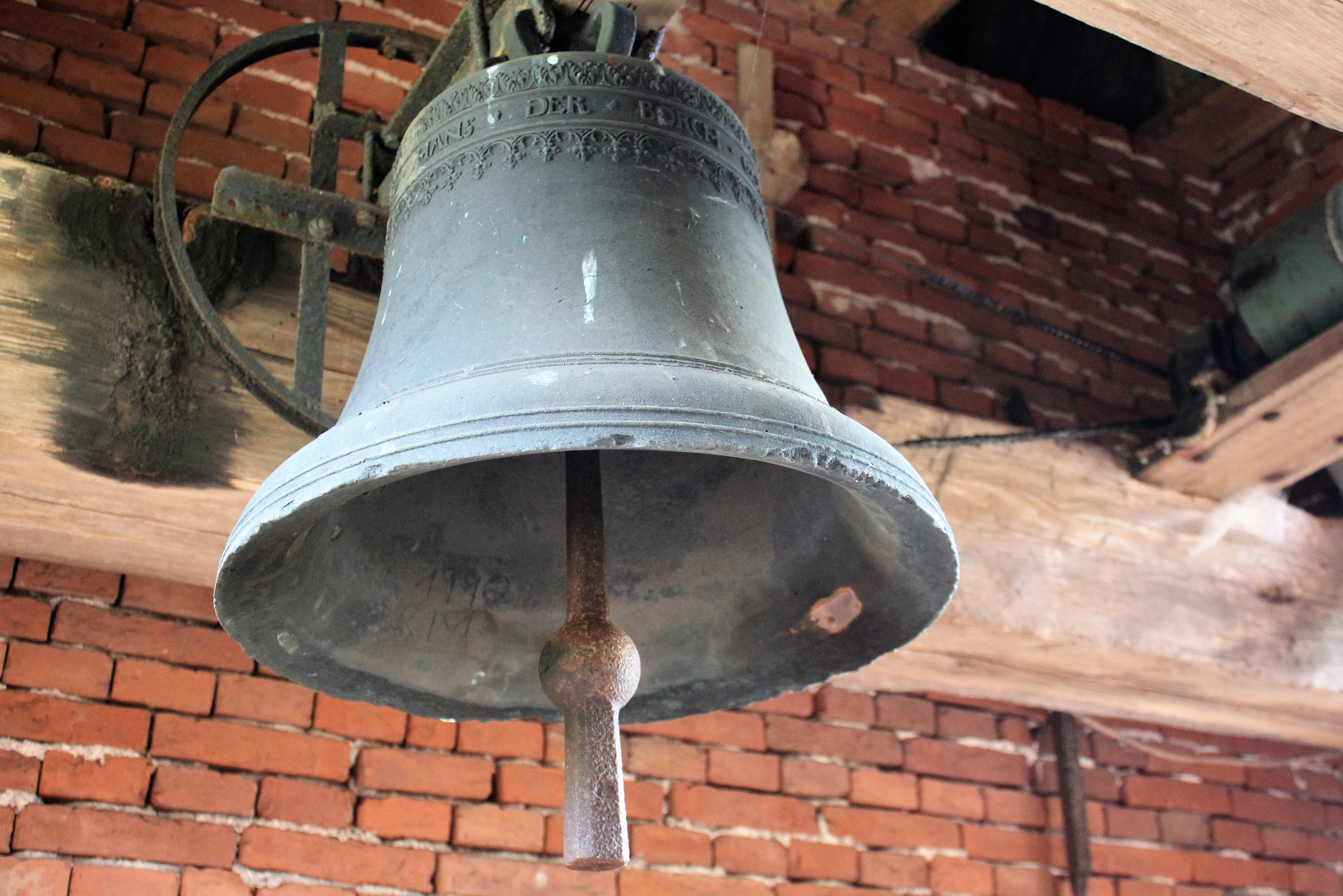 Ev.-reformierte Kirche St. Maria in Marienchor, Gemeinde Jemgum, Landkreis Leer, Ostfriesland, Deutschland